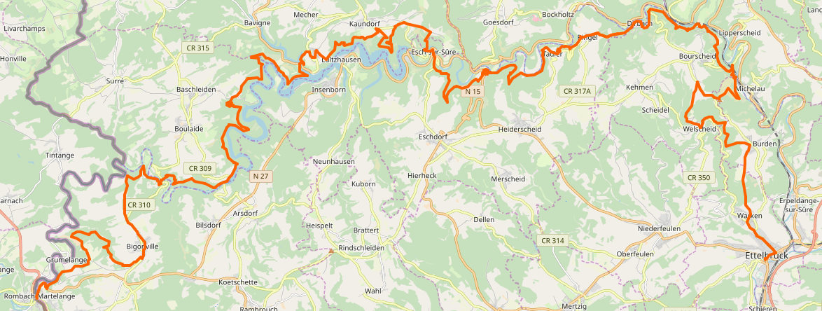 Streck vum Uewersauer-Pad